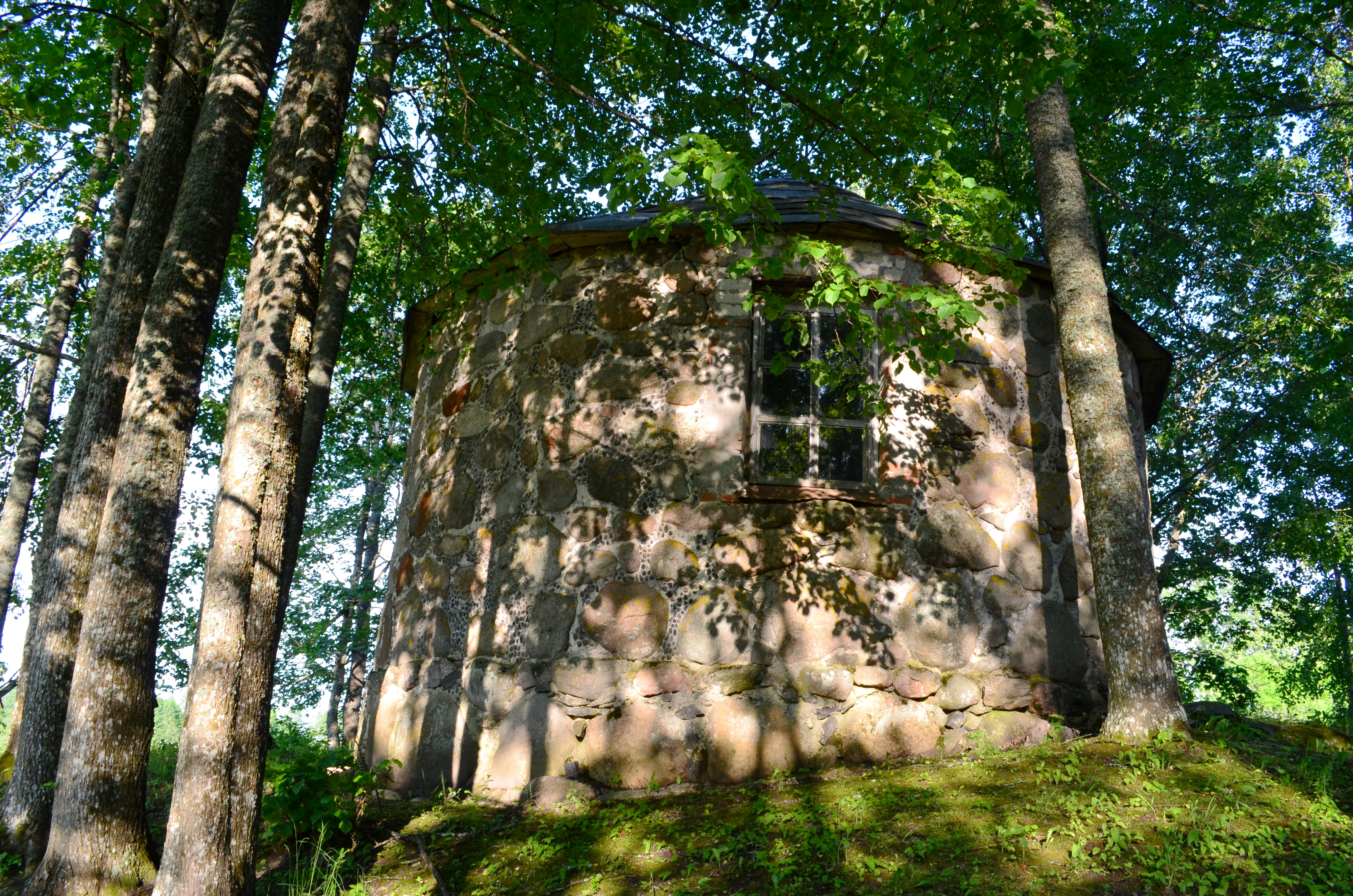 Nariūnų koplyčia, Salako sen., Zarasų r.